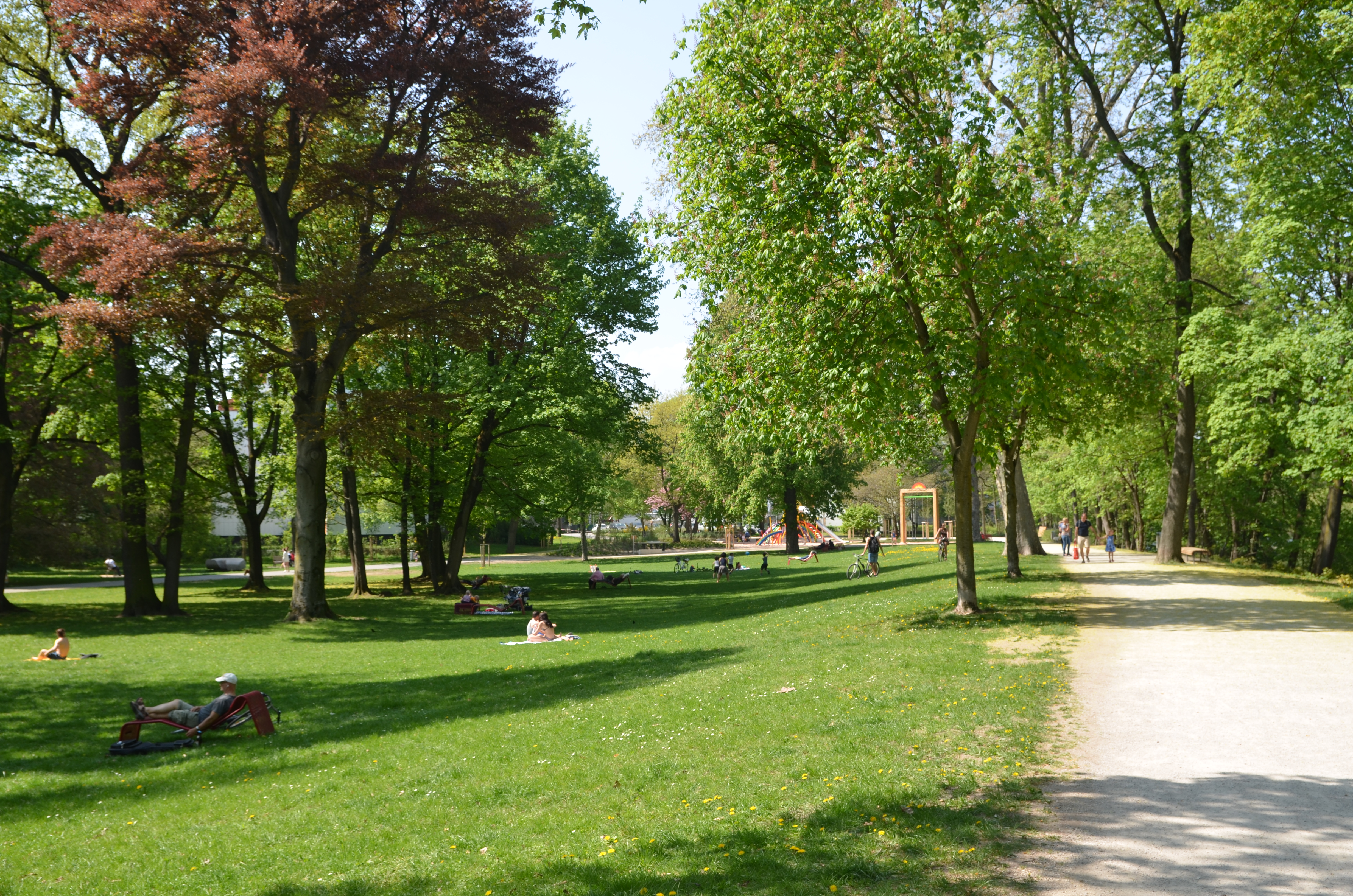 Kontumazgarten